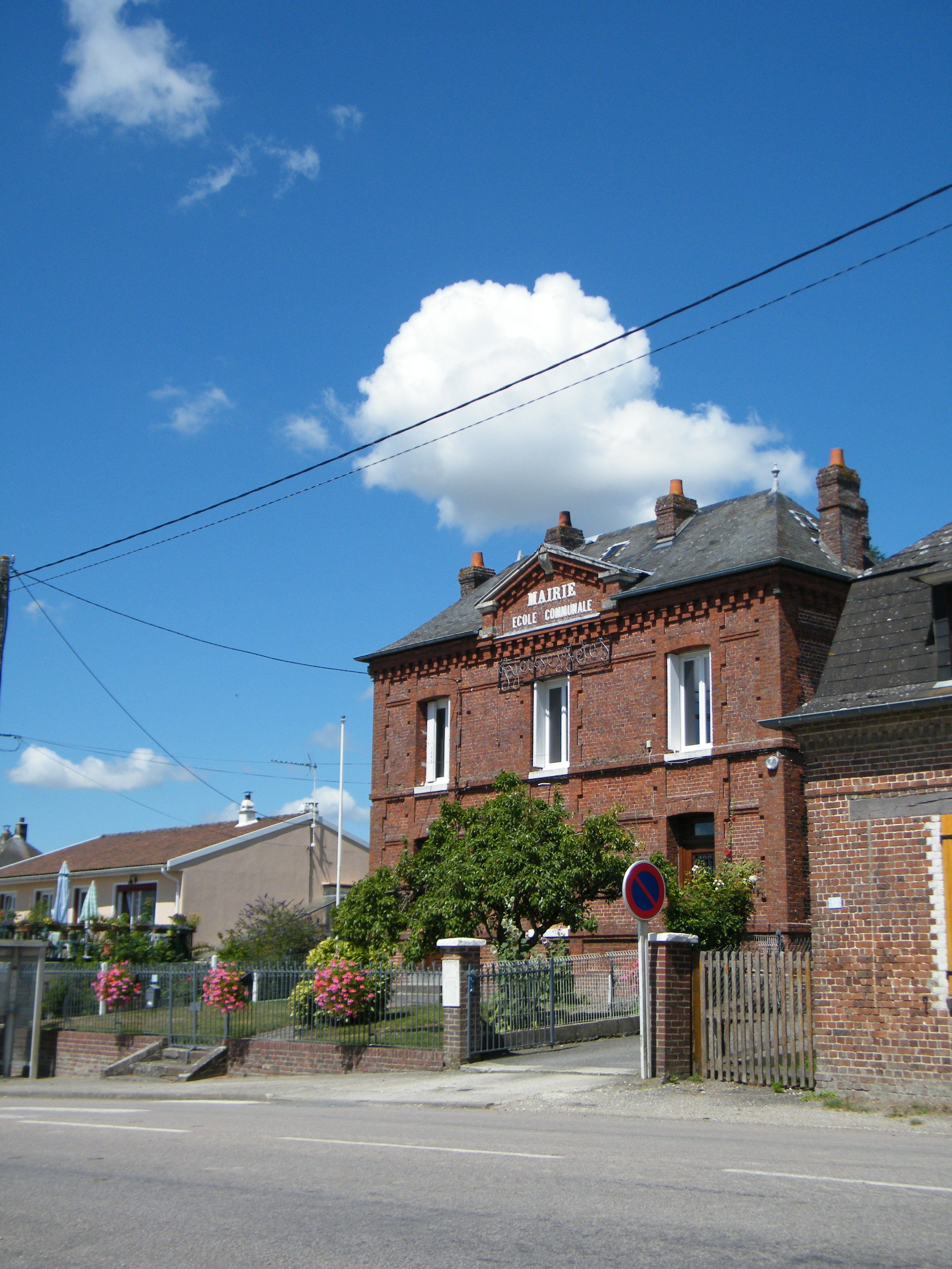 Fréauville, Seine-Maritime, France, mairie